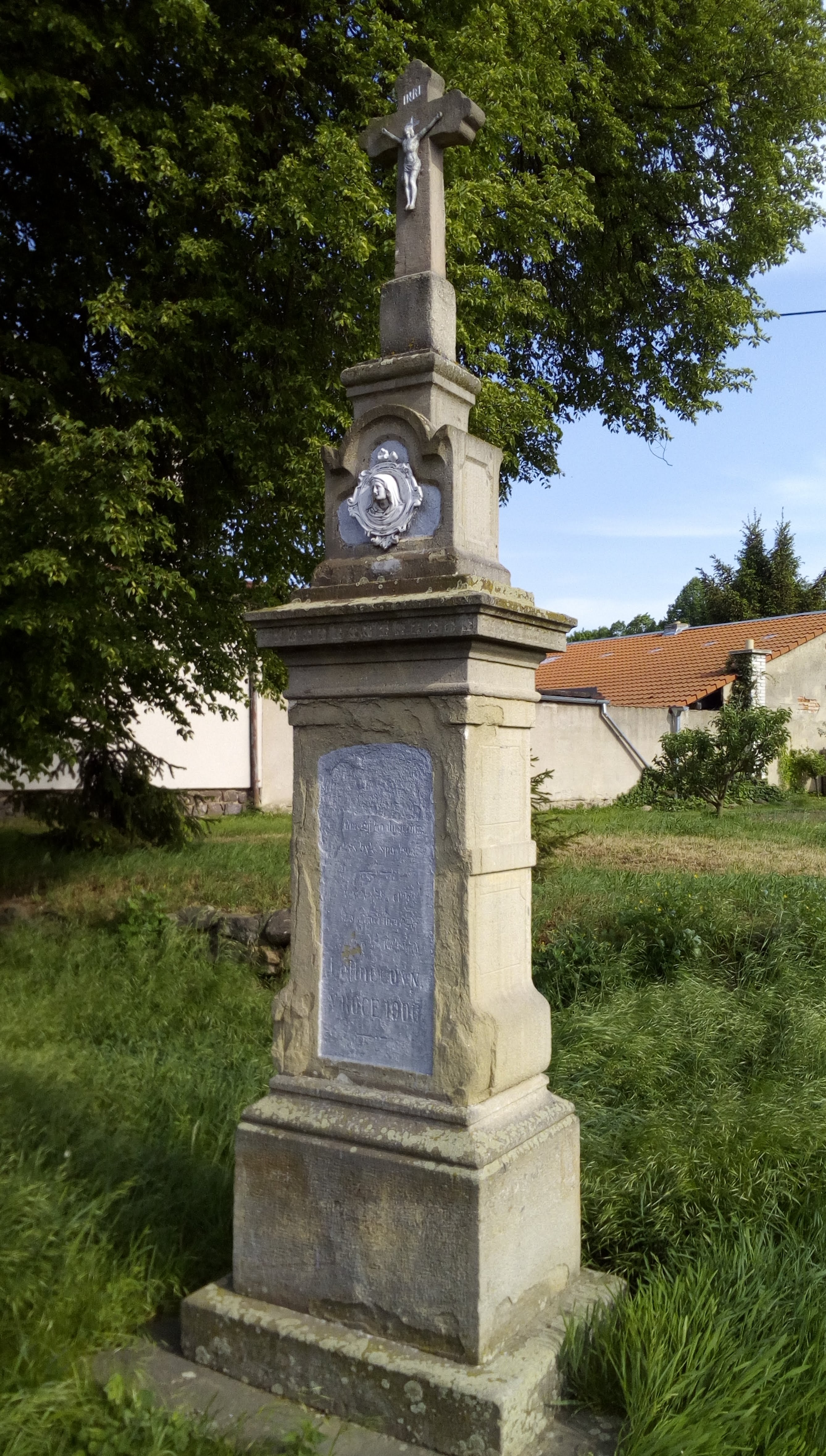 Kříž v Řeznovicích